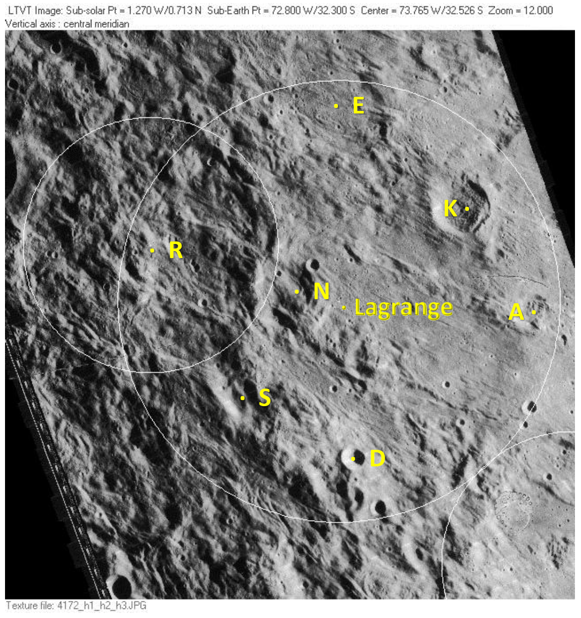 Lunar Orbiter. Imagen de detalle del cráter Lagrange y de algunos de sus cráteres satélite